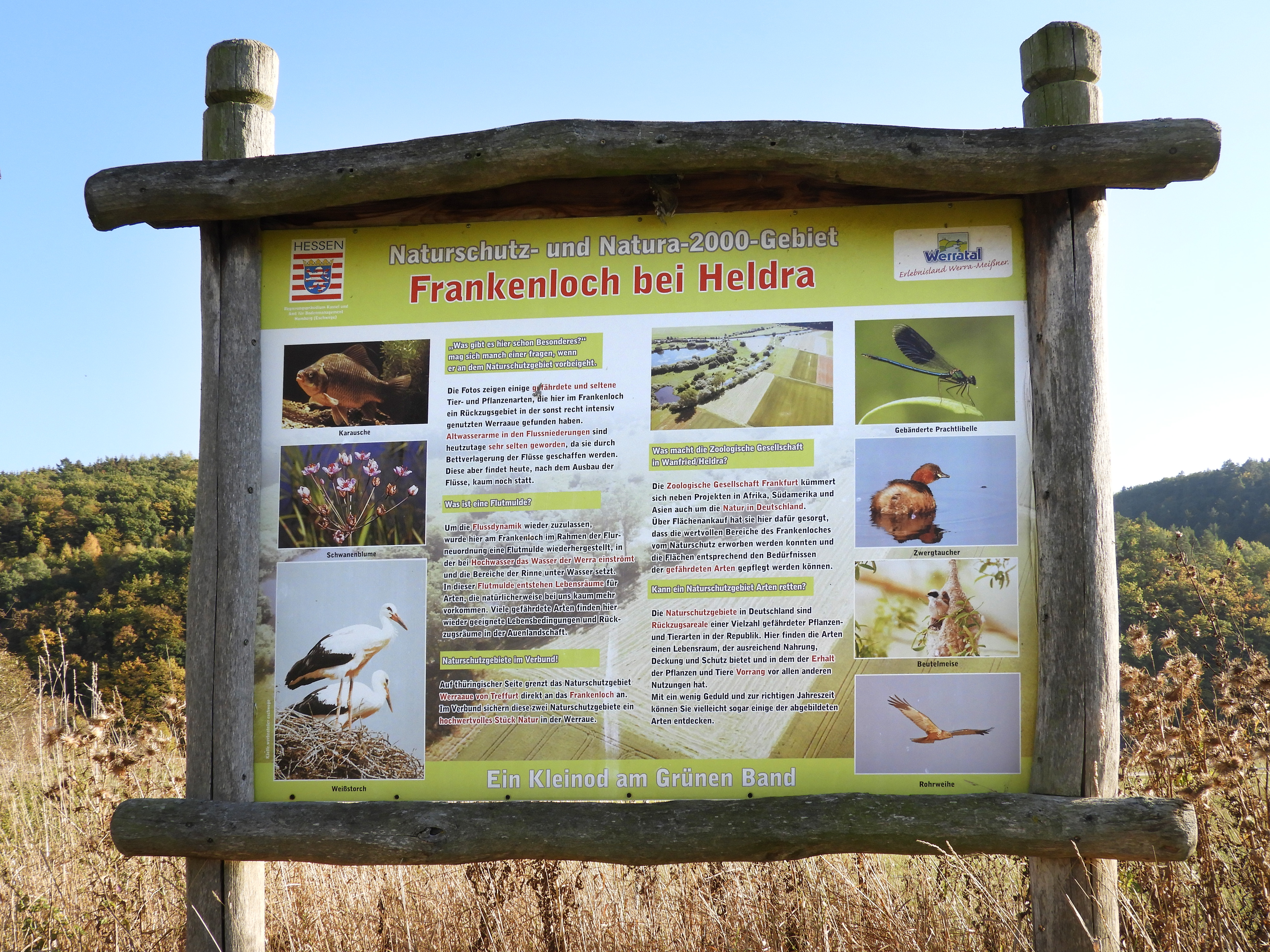 Informationstafel im Naturschutzgebiet. Um Akzeptanz für die Veränderungen im Schutzgebiet zu erreichen wurden neben der Holzbrücke über die Flutmulde zwei Infotafeln aufgestellt. Sie erteilen Auskunft über die ökologische Bedeutung des Frankenlochs und sollen den Besuchern ermöglichen den Sinn und Zweck der Maßnahmen nachzuvollziehen.